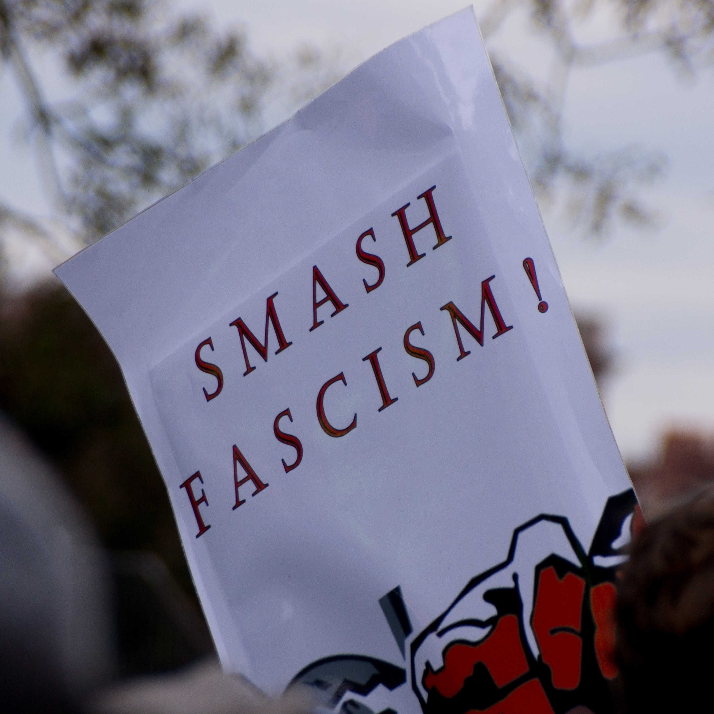 20171118-DSC03200